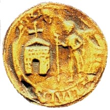 Date : septembre 2001. idem quel sont les droits